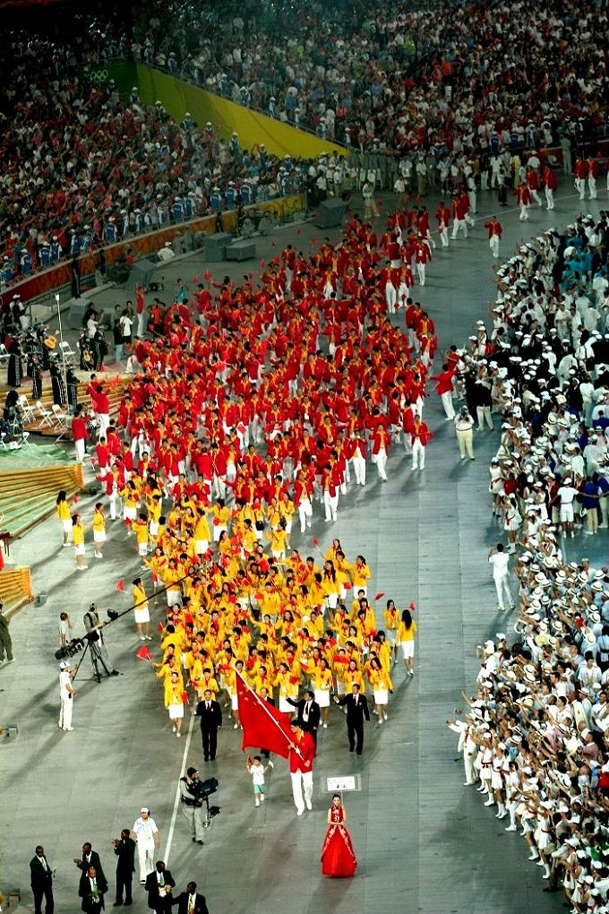 北京奥运会开幕式中国代表团入场